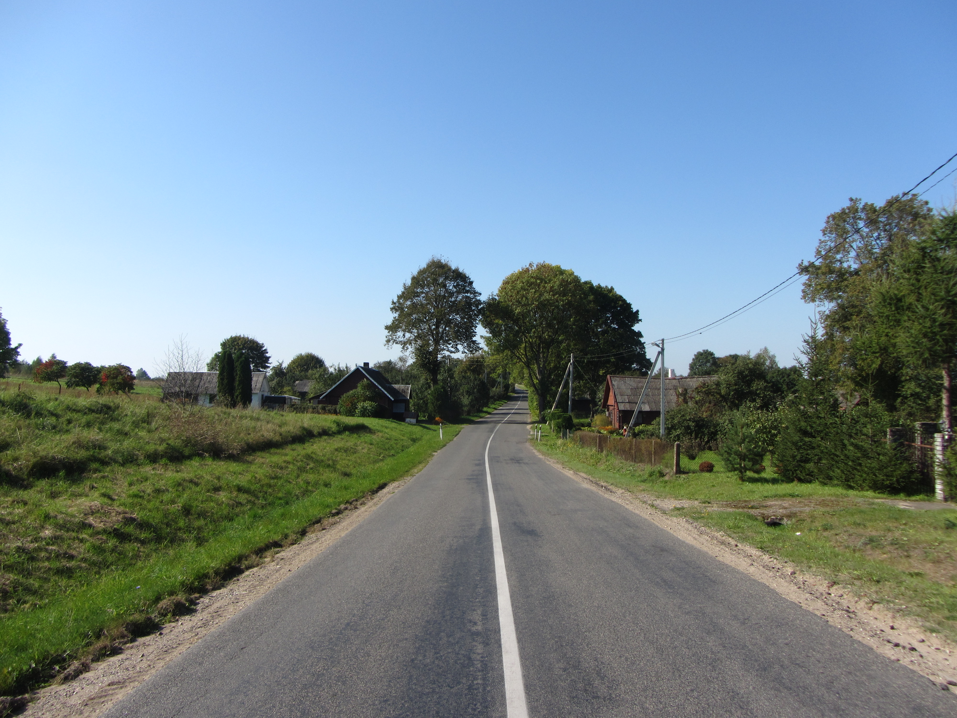 Antakalnis 21190, Lithuania